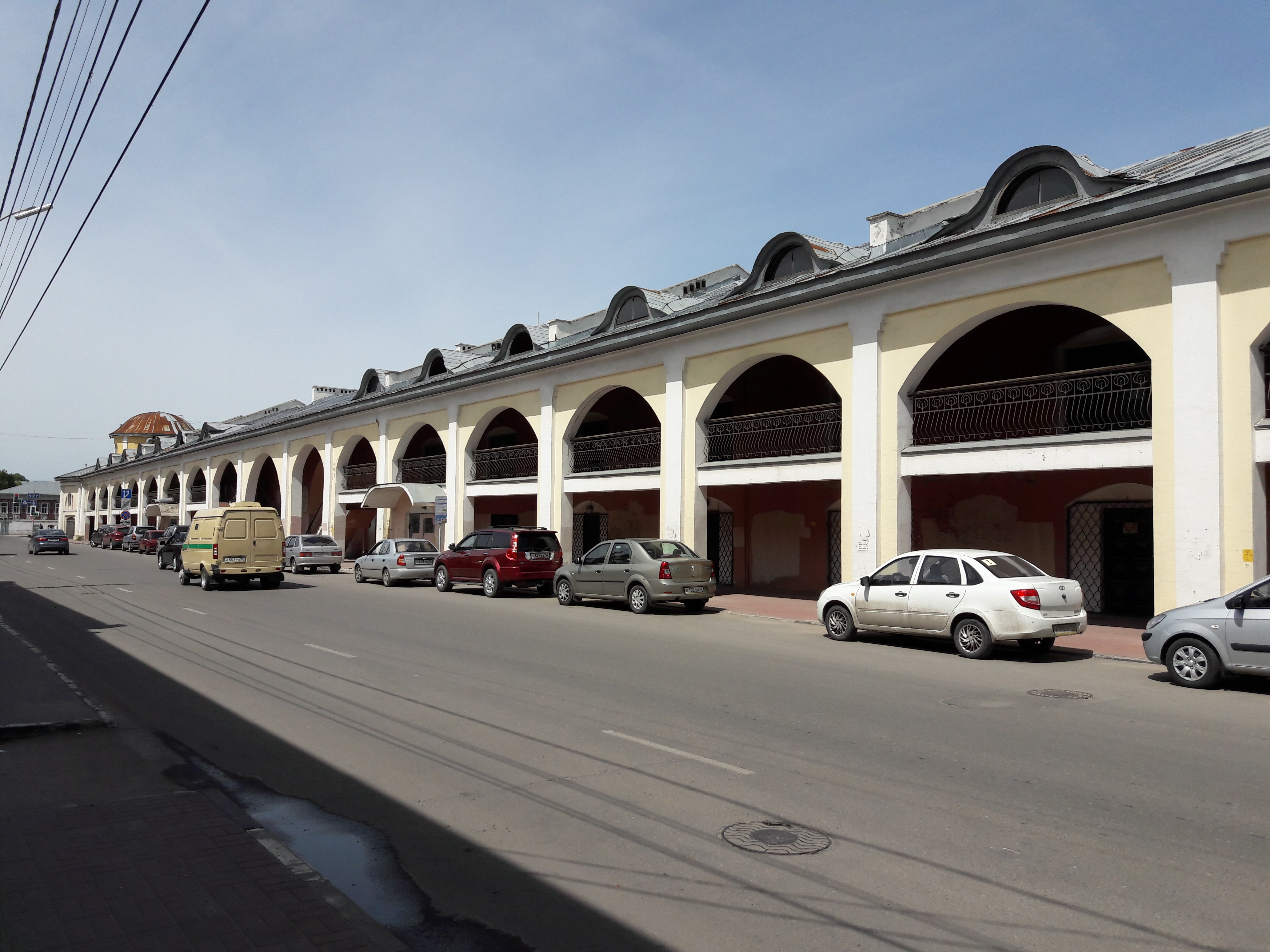 Торговые Ряды в Рязани